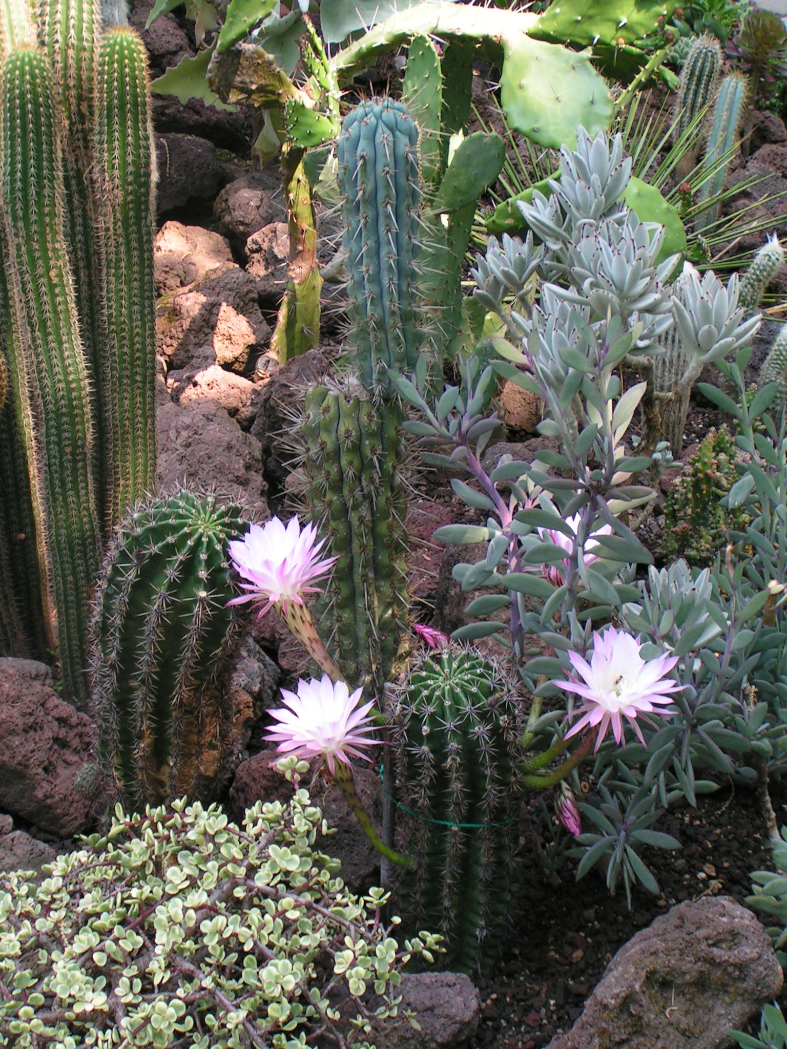 Kaktus-Rondell im Park des Schlosses Schönau in Bad Säckingen